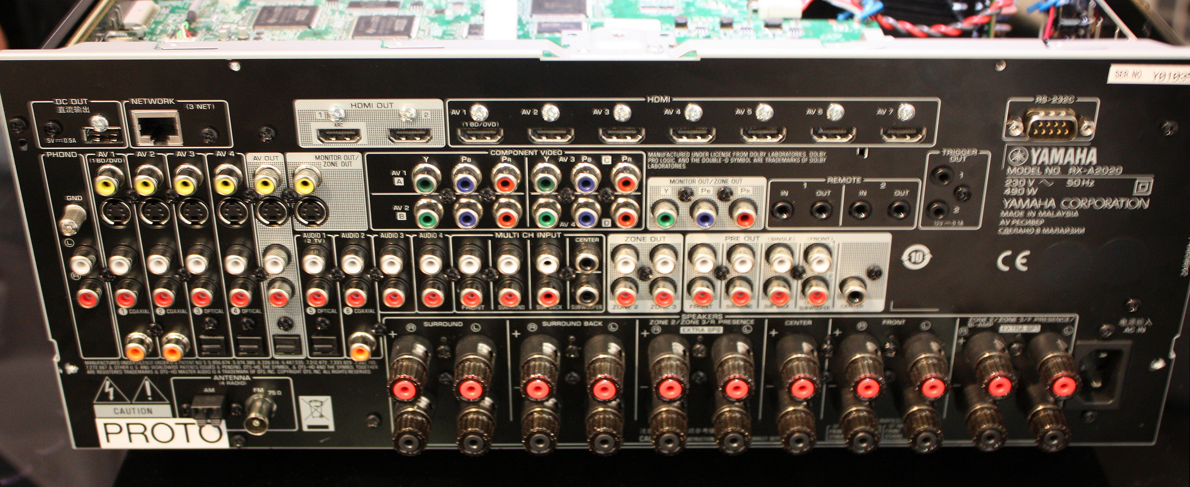 Internationale Funkausstellung 2012